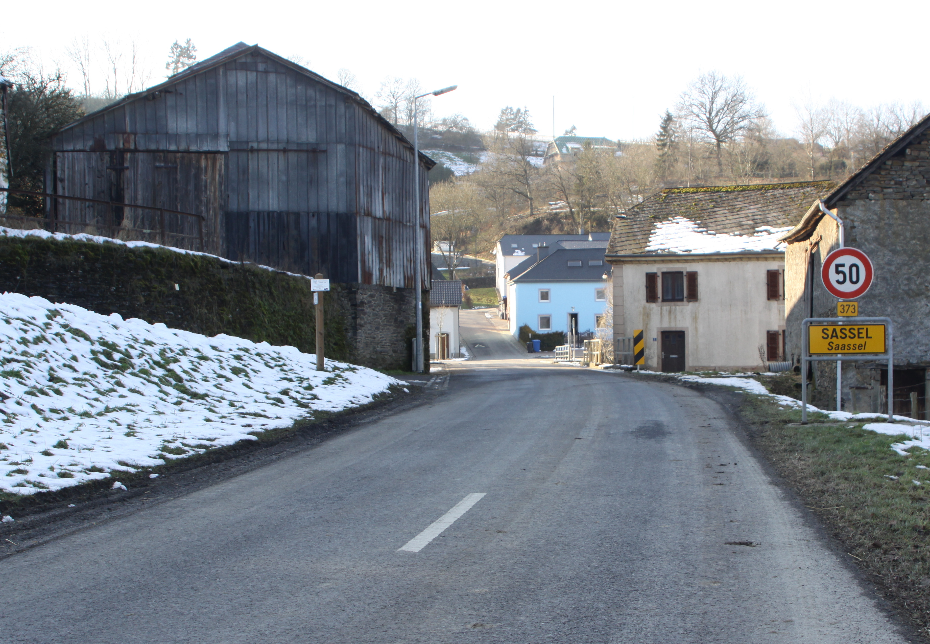 Saassel, Vue an d'Uertschaft